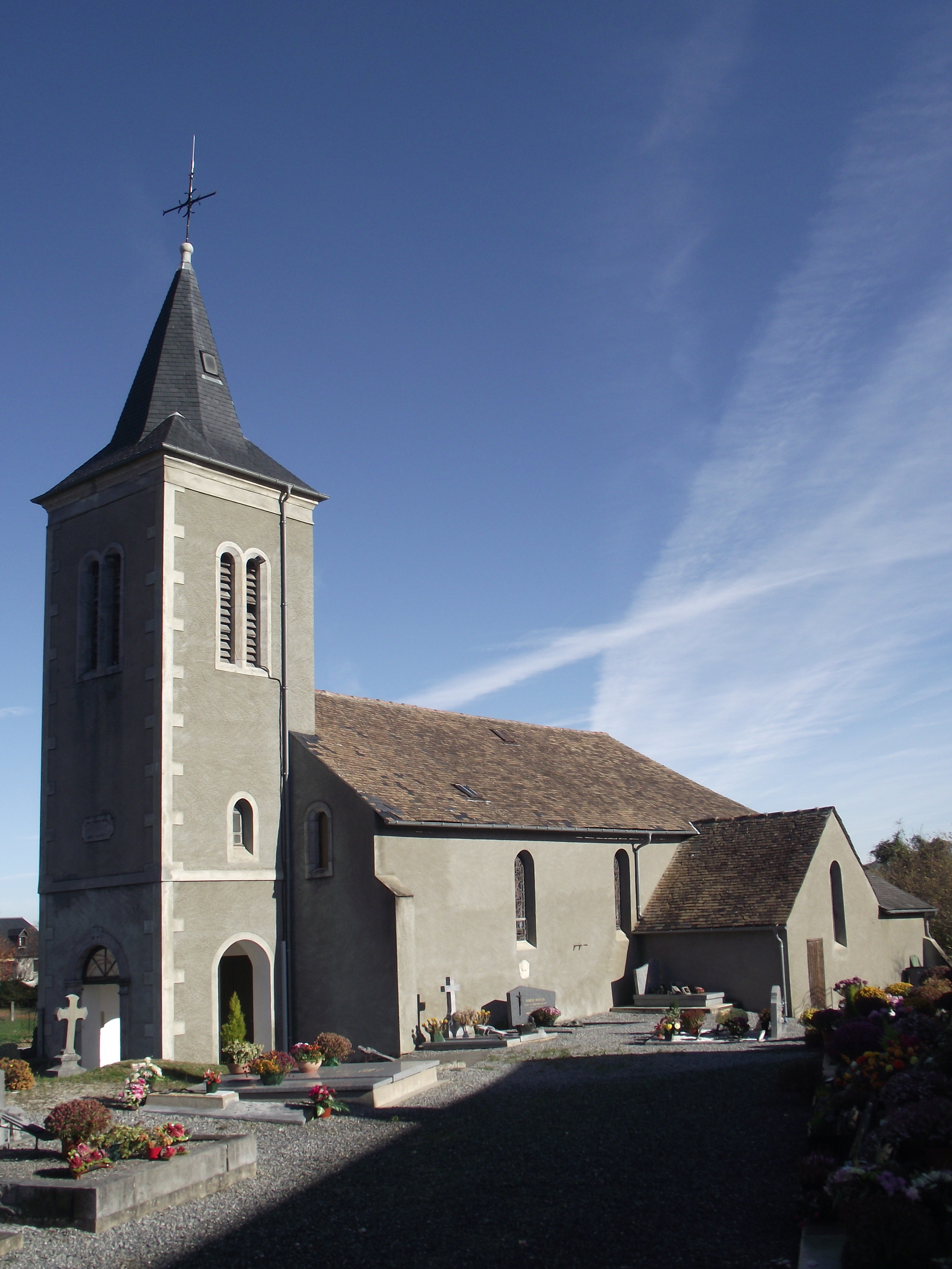 Église Saint-Michel de Lahitte (Arrayou-Lahitte, Hautes-Pyrénées, France)